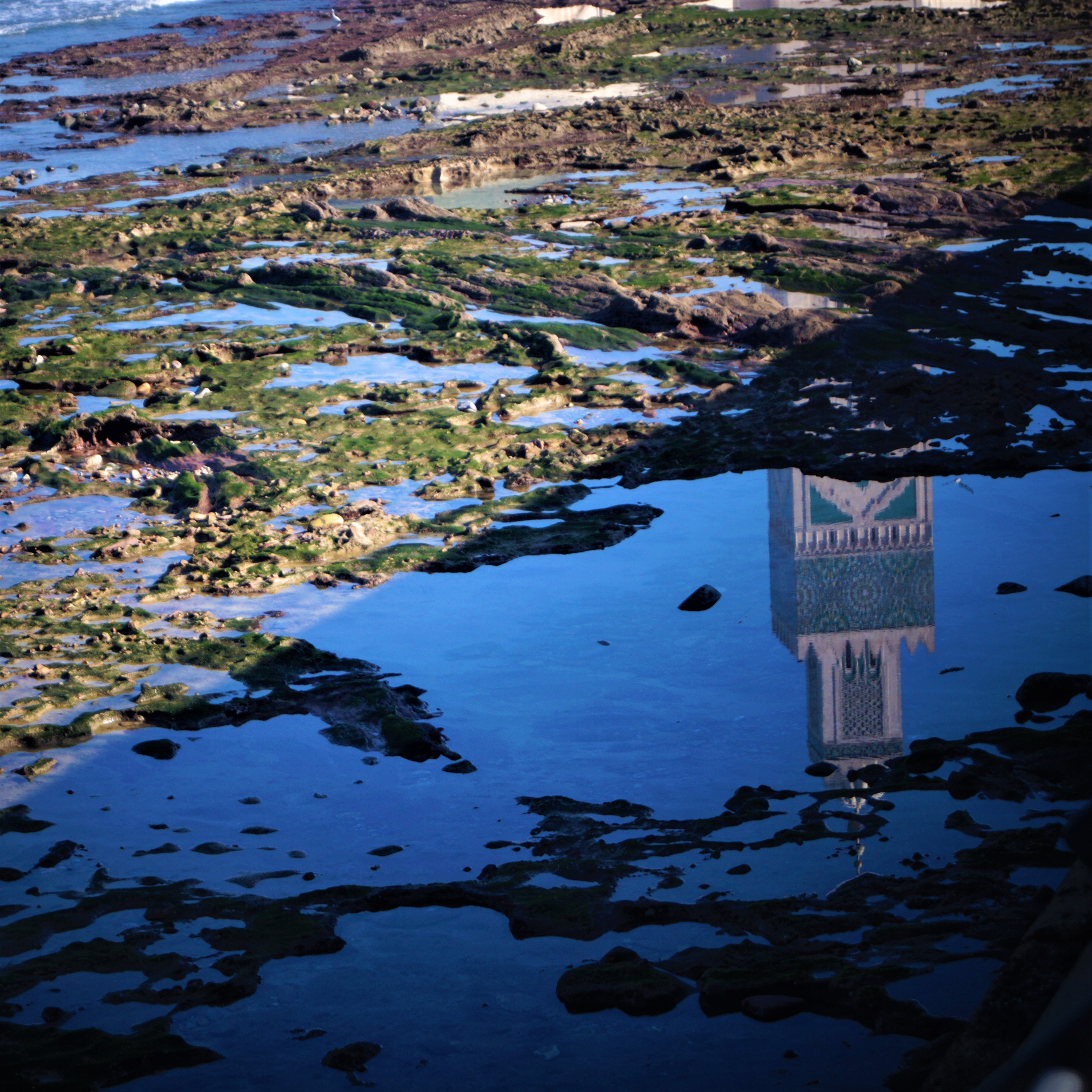 Imagen del minarete de la mezquita Hassan II de Casablanca, reflejada en el agua del Atlántico.